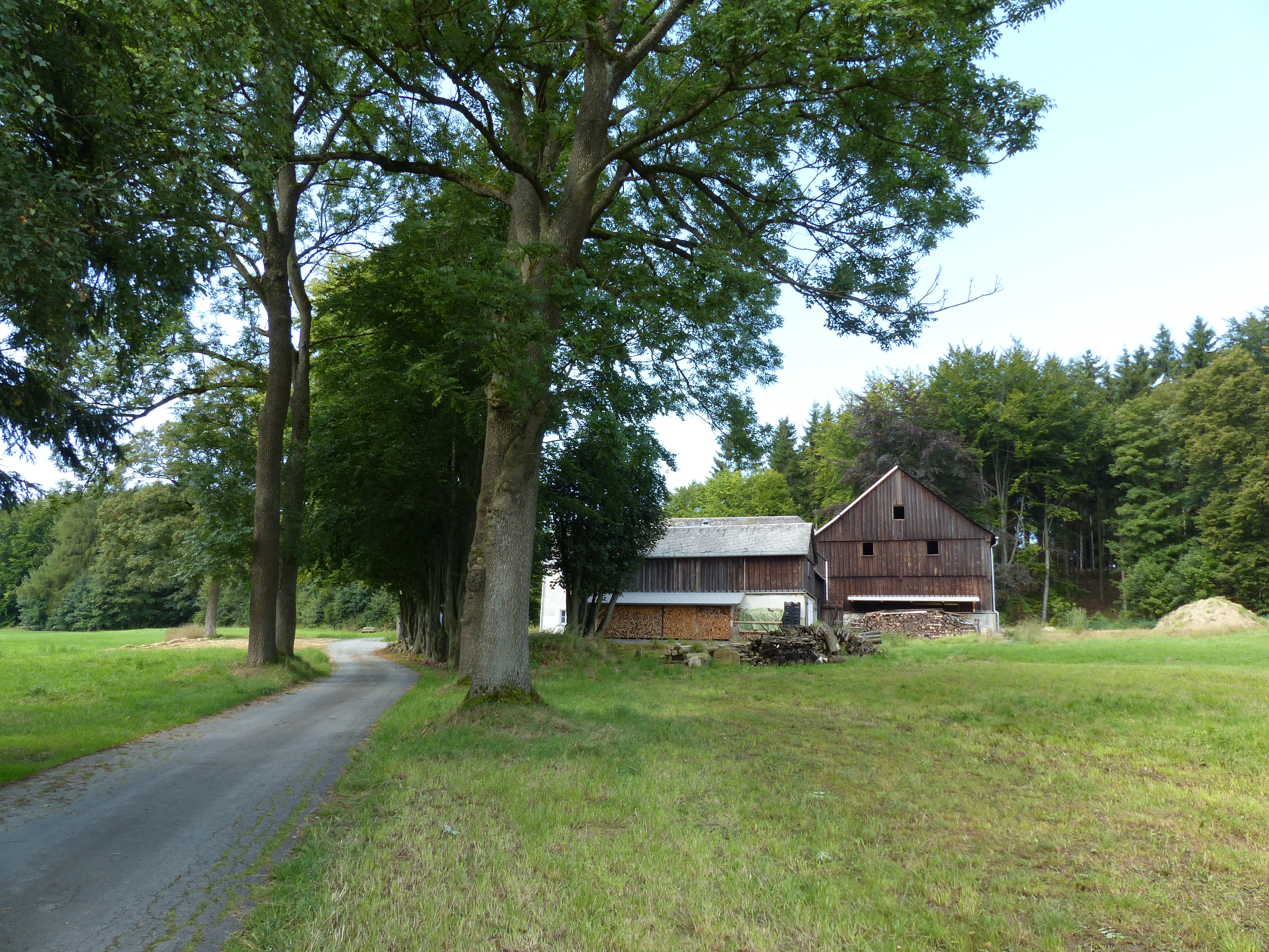 Ansicht eines Baudenkmals im Gemeindegebiet von Konradsreuth, Landkreis Hof